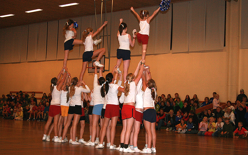 Et av Wapz-lagene fra Sauda. Klubben har flere medaljer fra NM, inkludert to førsteplasser.